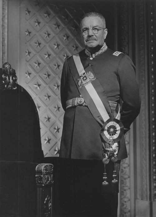 Carlos Ibáñez del Campo durante su segundo período presidencial (1952-1958)